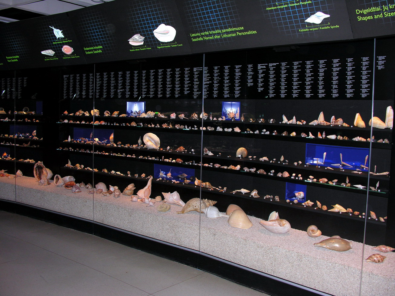 Lietuvos jūrų muziejus Foto: Algirdas, 2006 m. birželio 29 d.